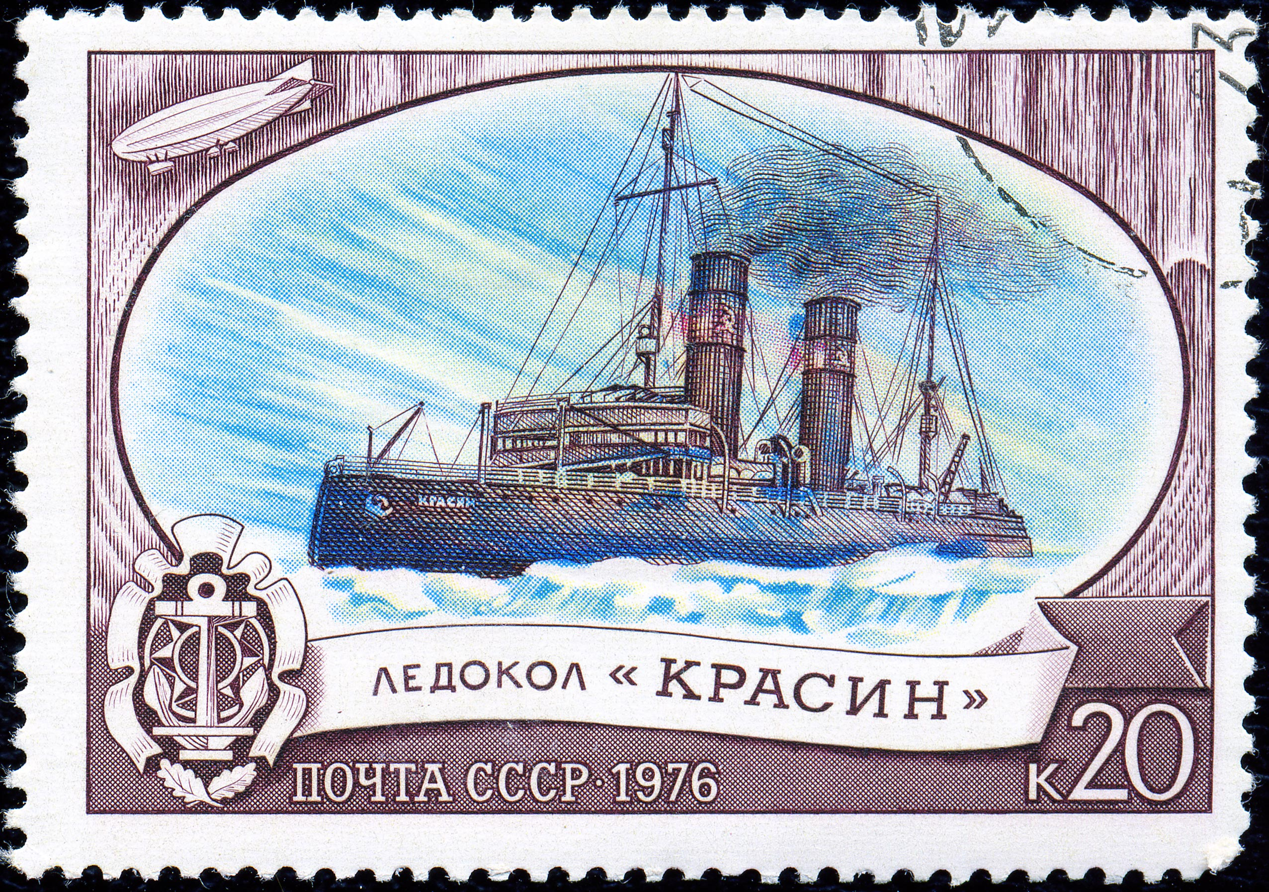 Почтовая марка СССР. 1976. Ледокол Красин